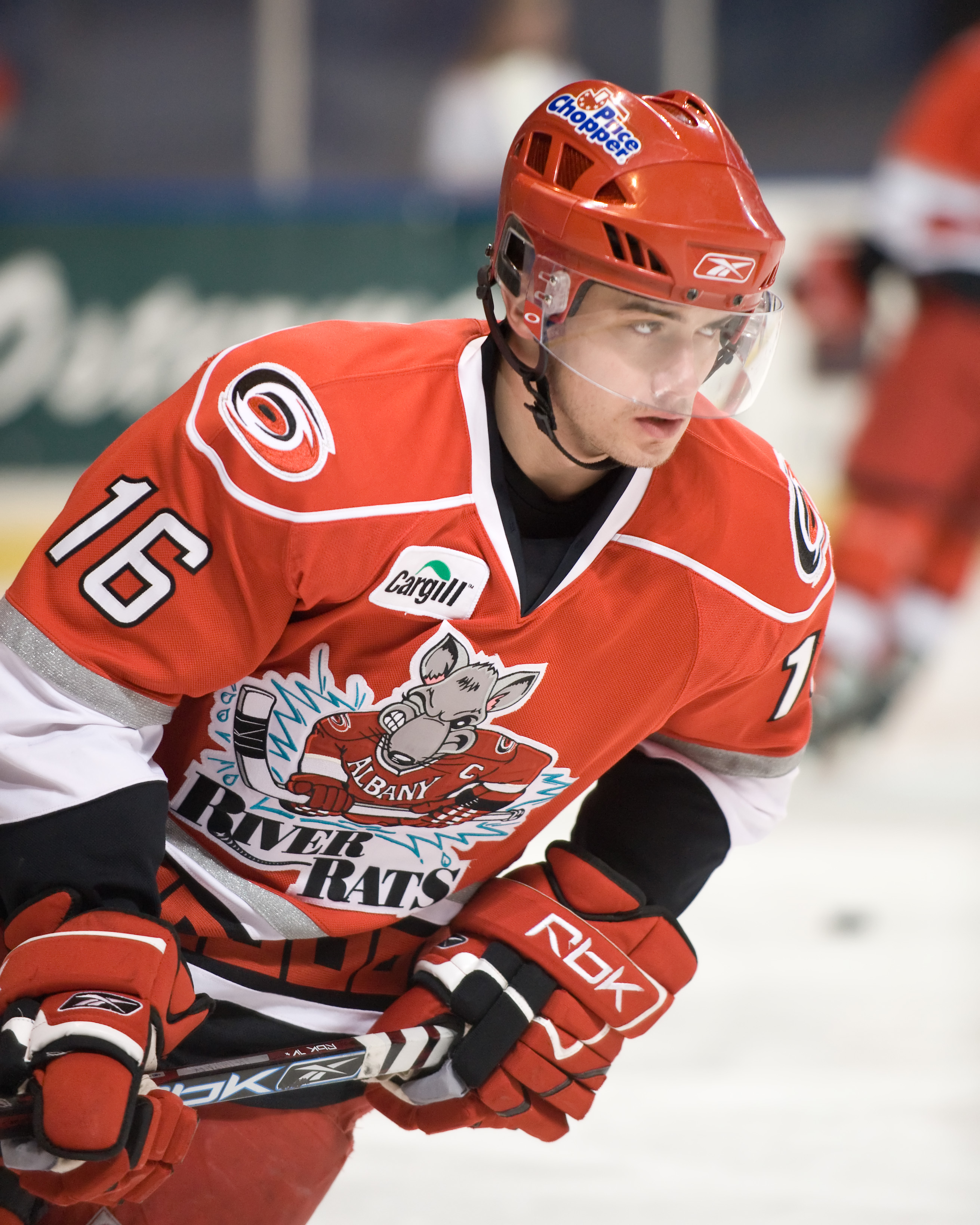 Jakub Petruzalek